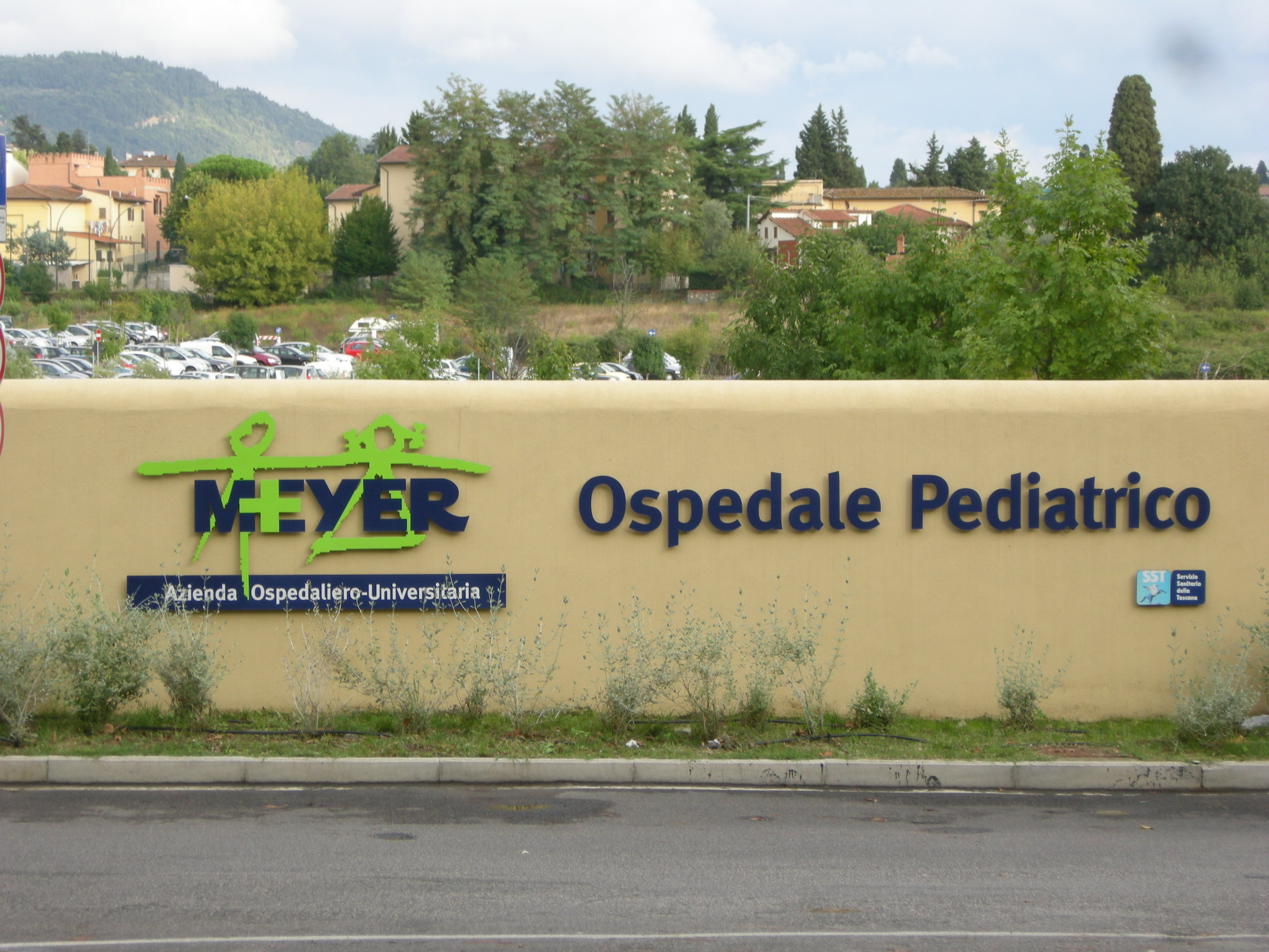 Ospedale meyer, ingresso